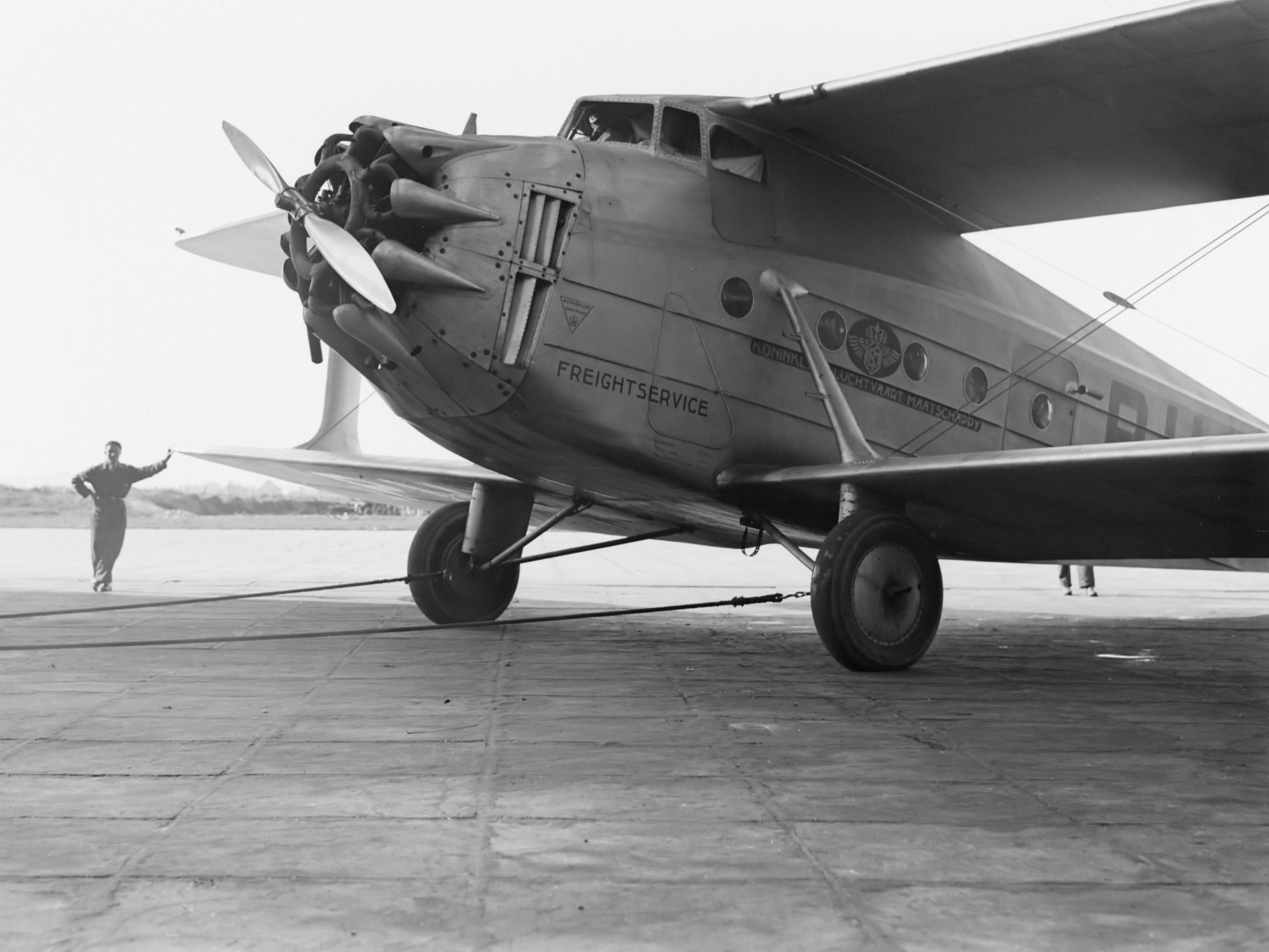 Reportage Schiphol. Vrachtvliegtuig op Schiphol 1933